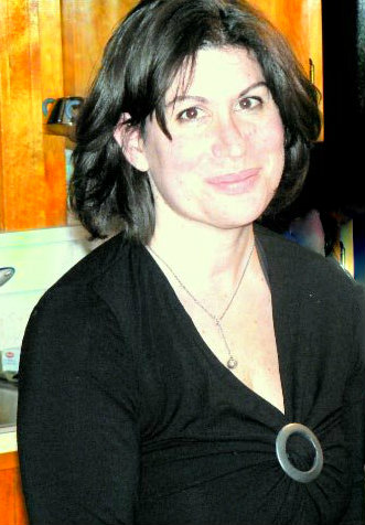 Wiki bio photo